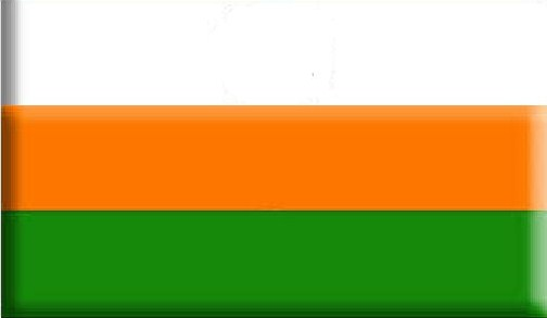 Bandera de Caraguatay